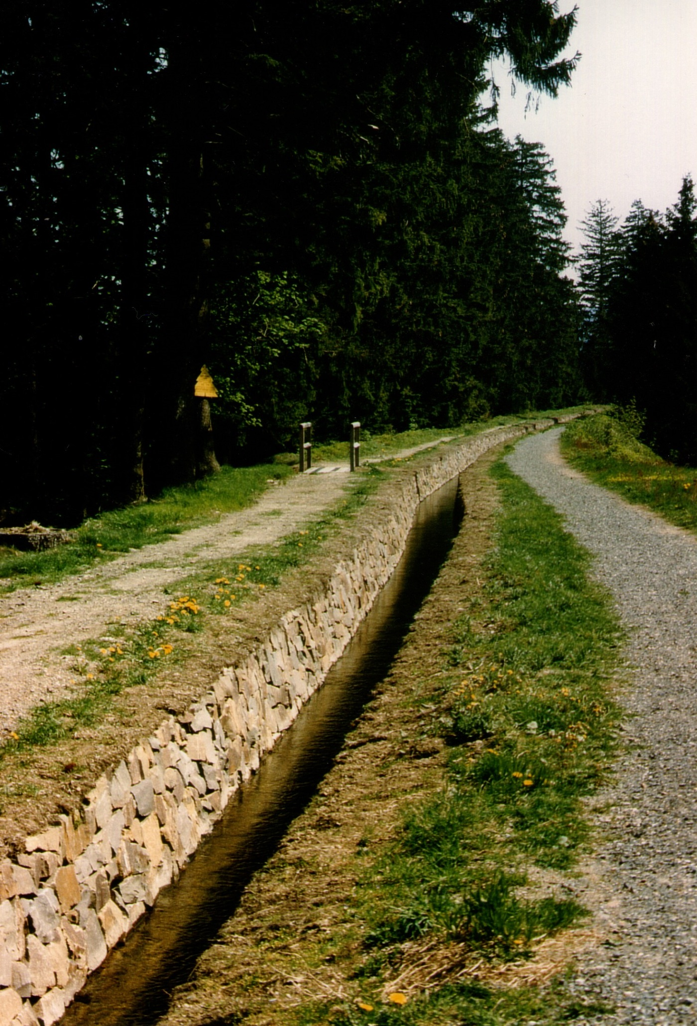 Dammgraben im Bereich Sperberhaier Dammes